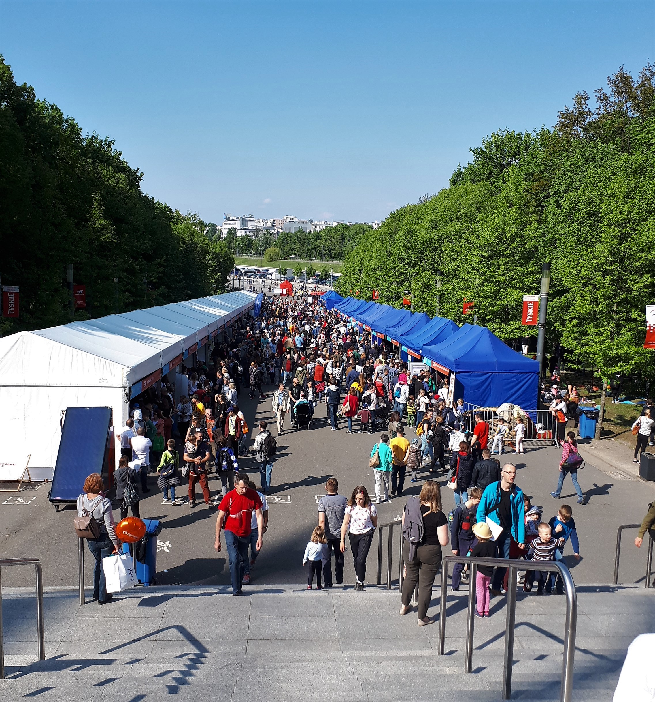 Centrum Nauki Kopernik, Polskie Radio - 23. Piknik Naukowy 2019